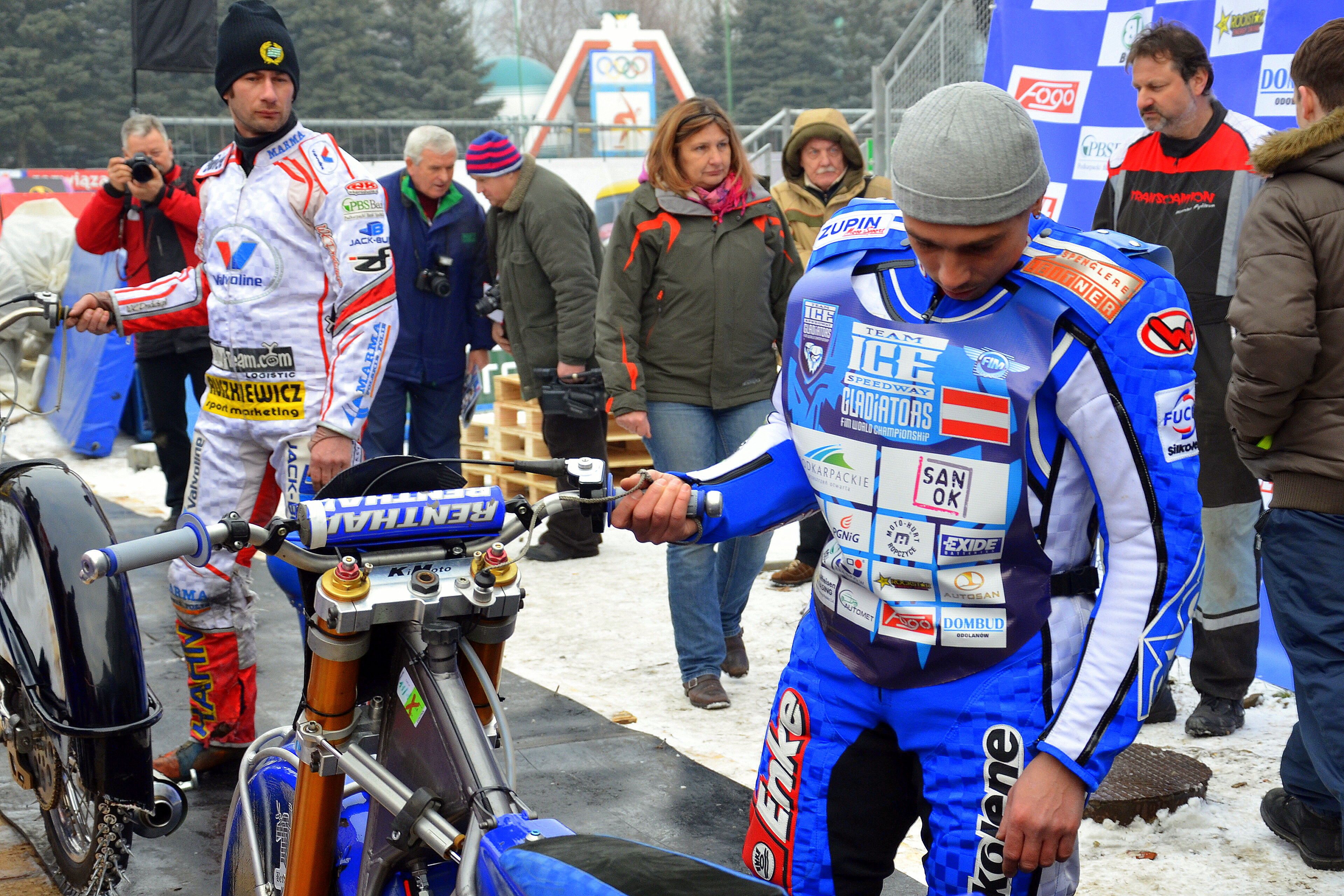 Finallauf zur Weltmeisterschaft 2013 im Eisspeedway in Sanok am 25. Januar 2013